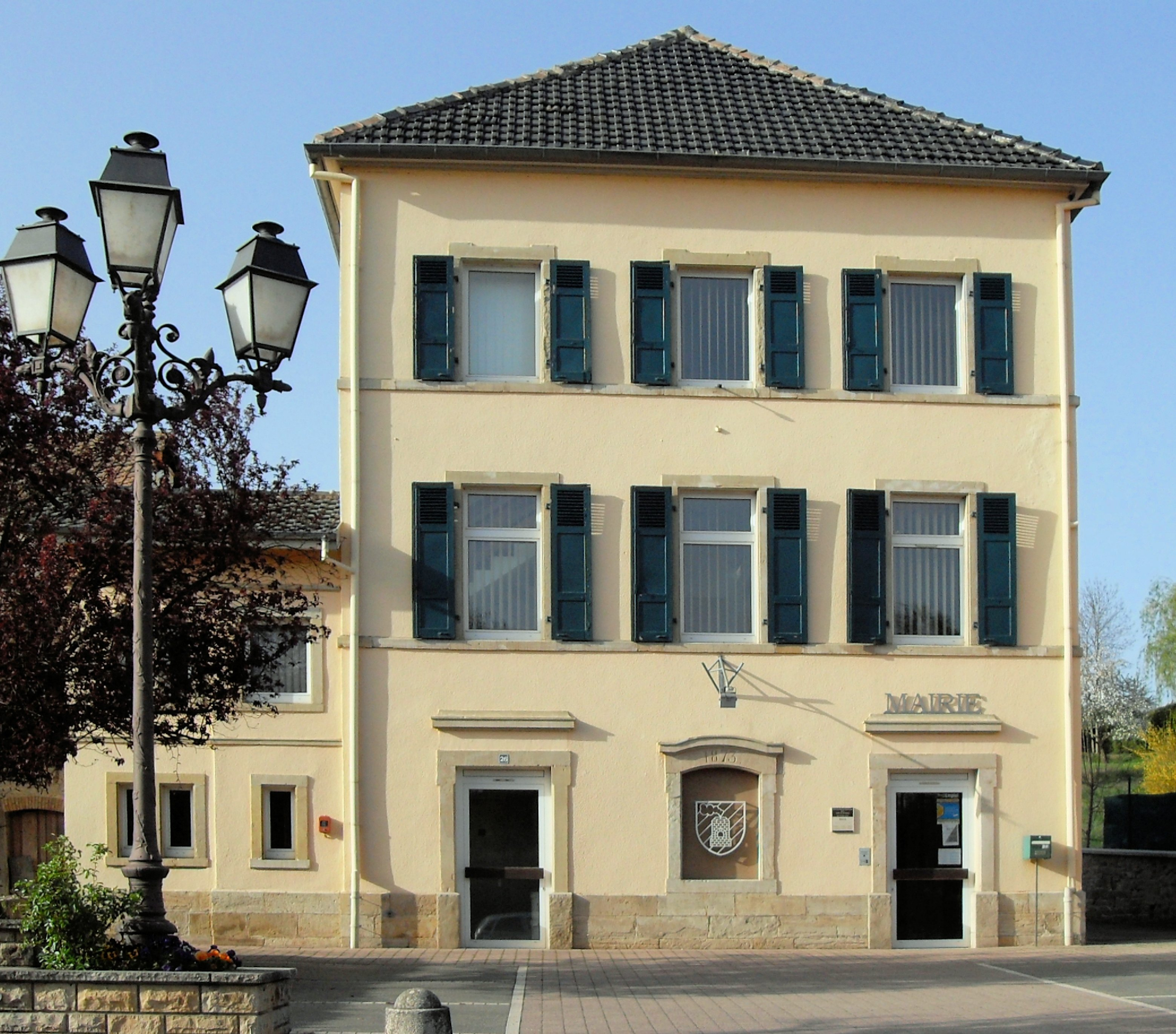 La mairie d'Emlingen